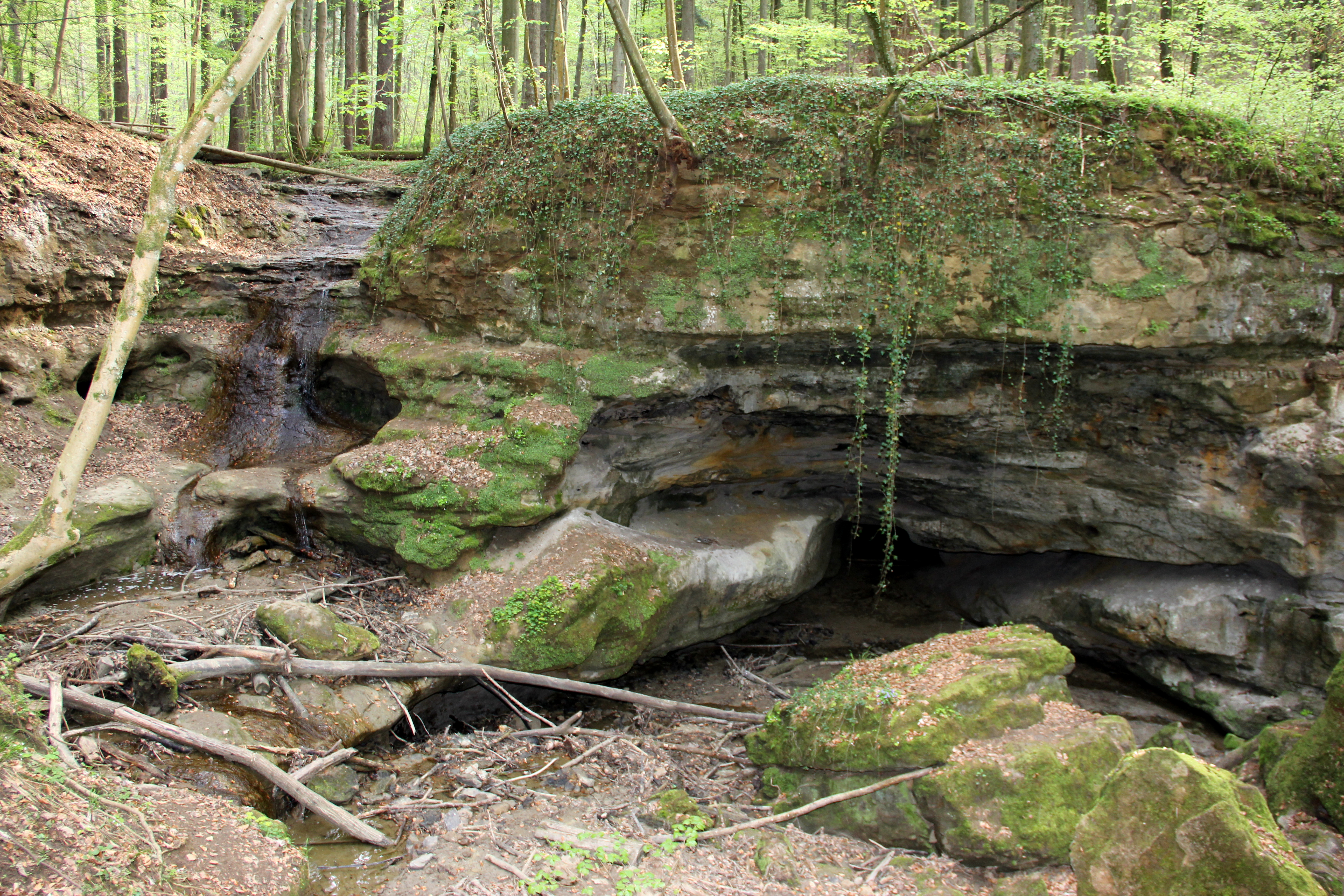 Teufelskirche bei Grünsberg, Seitental